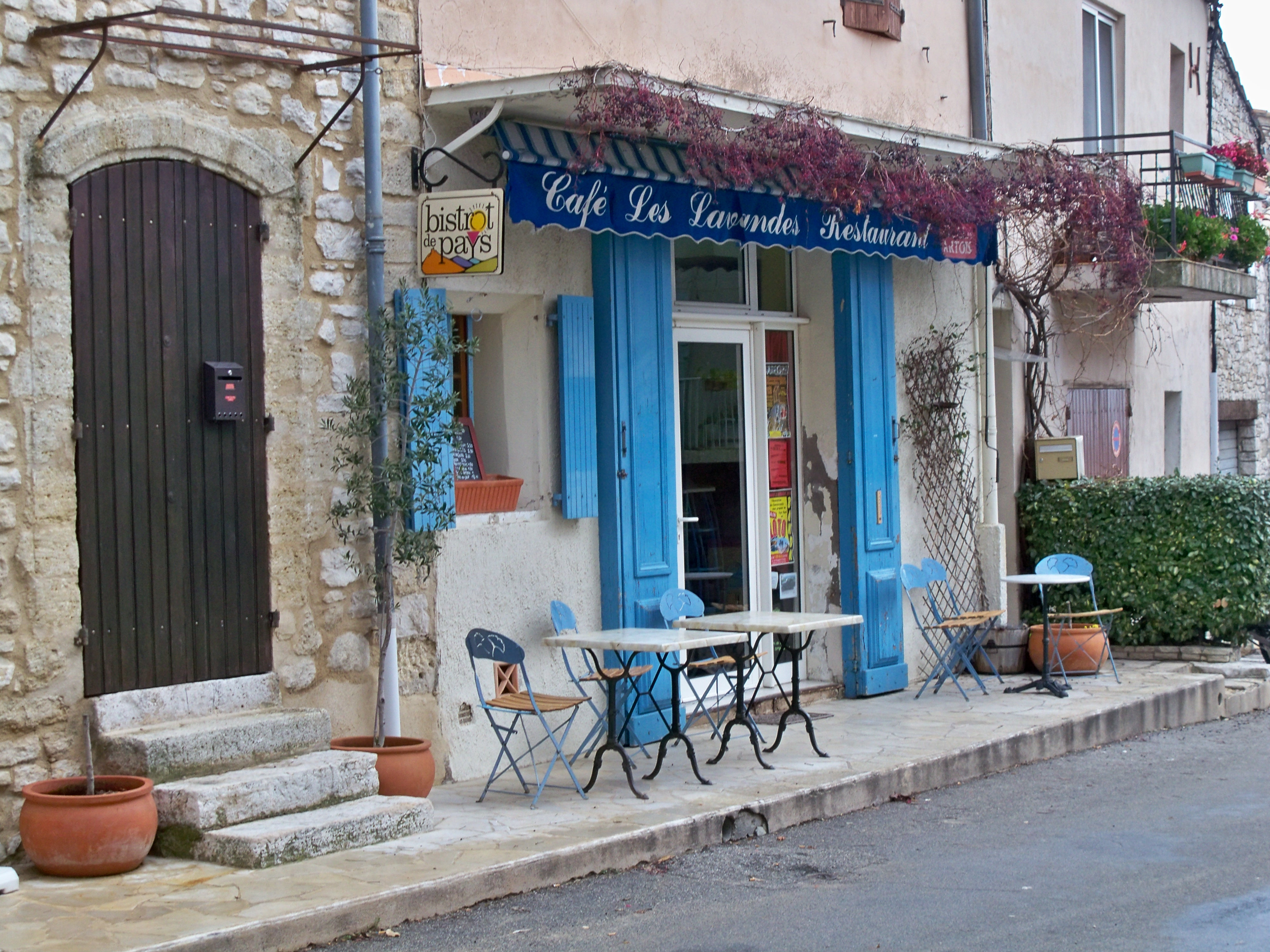 Bistrot de Pays à Vachères (04)